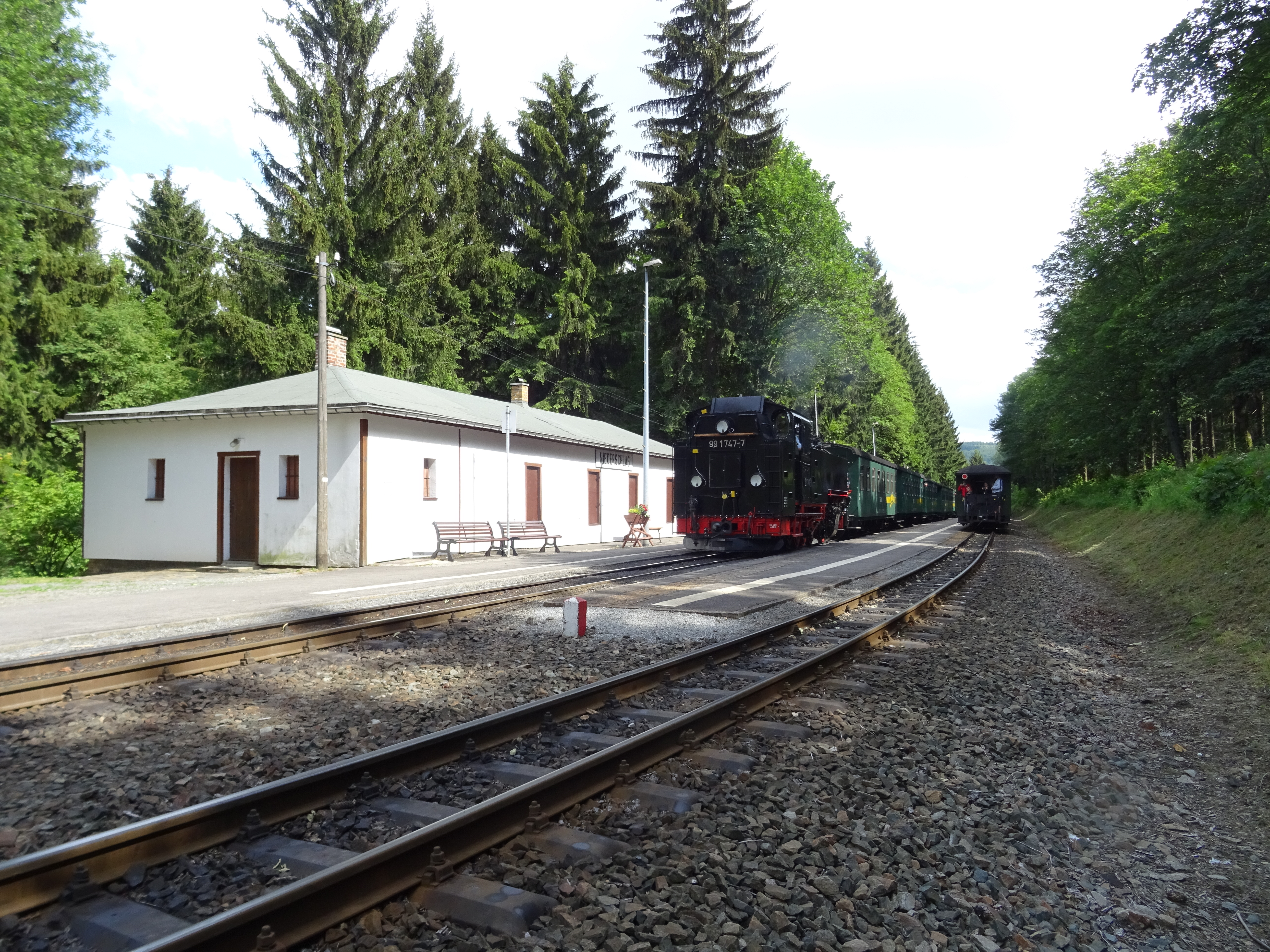 Kreuzungsbahnhof Niederschlag der Fichtelbergbahn Cranzahl nach Oberwiesenthal.